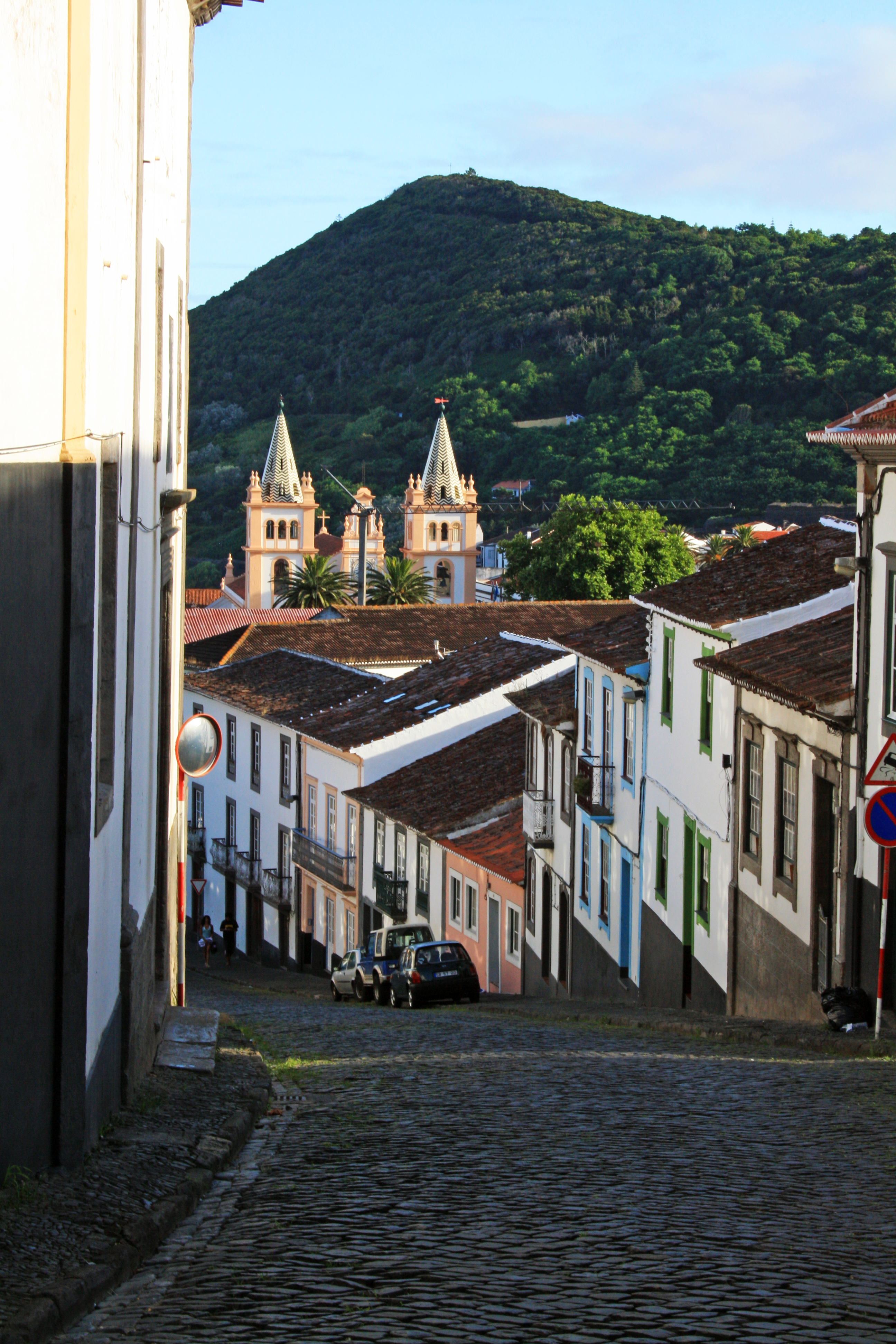 Rua que desce para o centro de angra